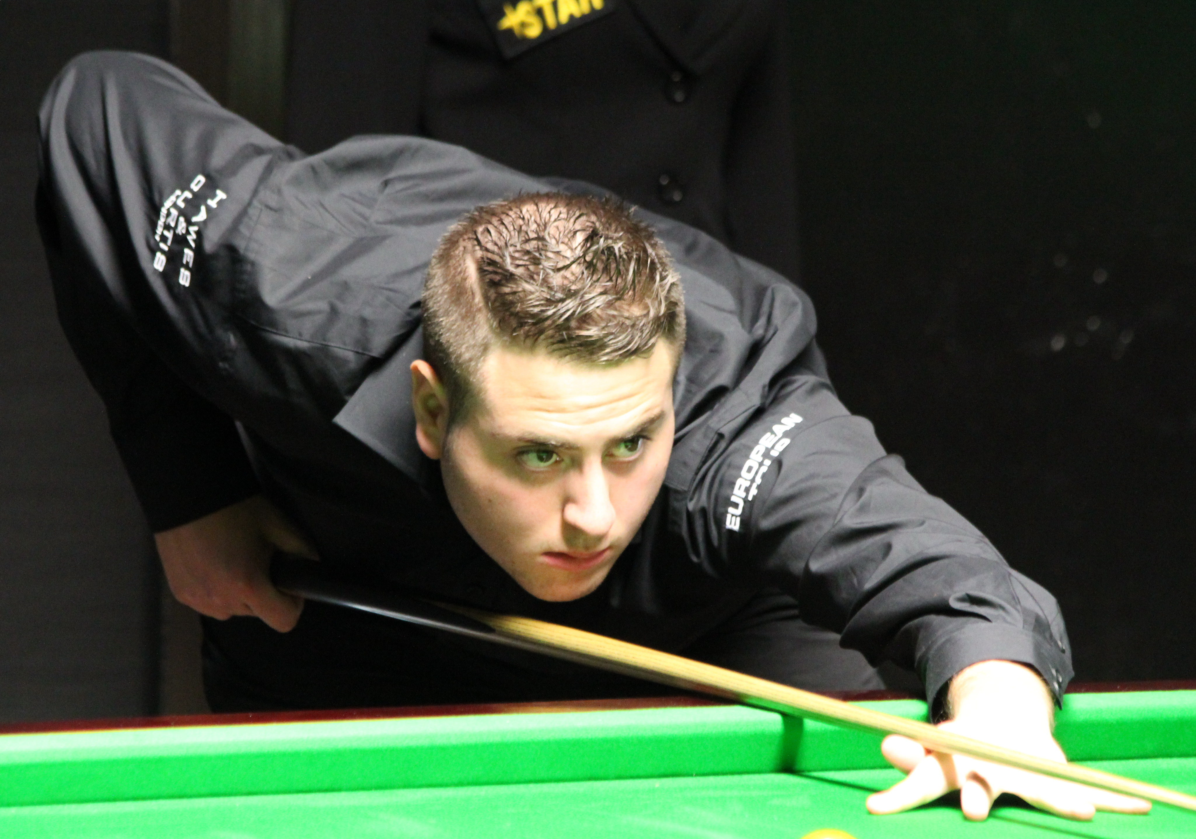 Eden Sharav beim Paul Hunter Classic 2014